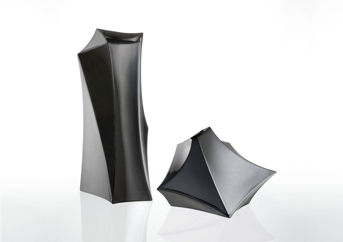 STARDUST VASE